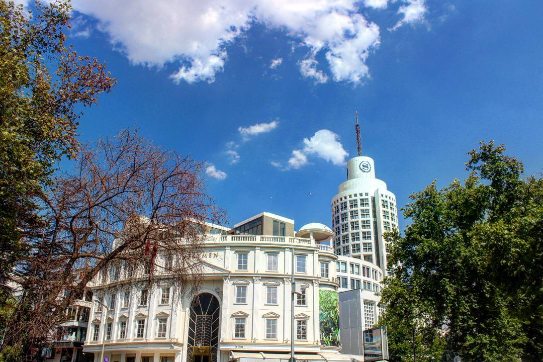 Kuğulu Park'tan otelin görünüşü. Önde Karum Alışveriş Merkezi, arkada Ankara Sheraton Oteli.